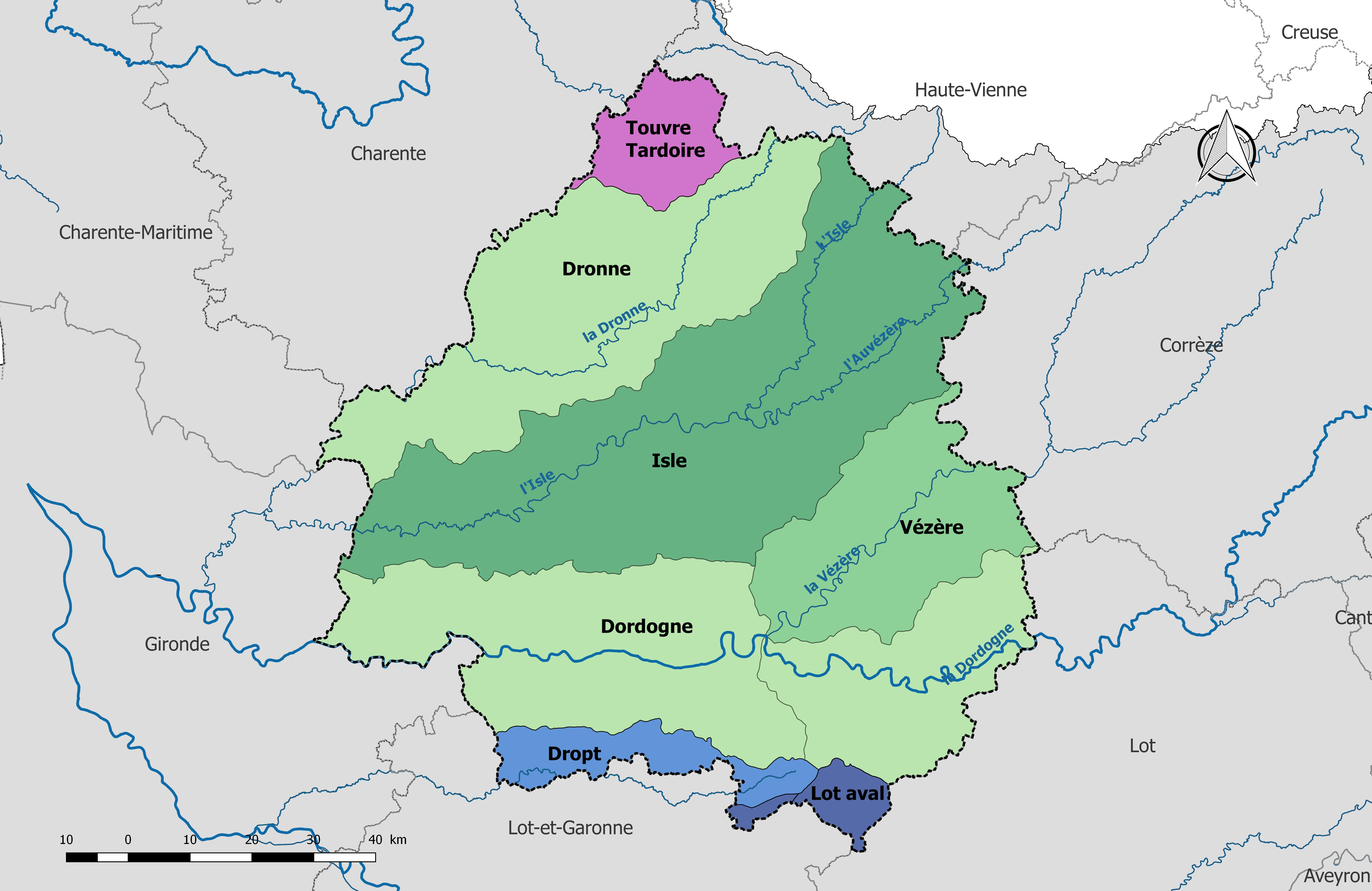 Principaux bassins versants du département de la Dordogne (France).